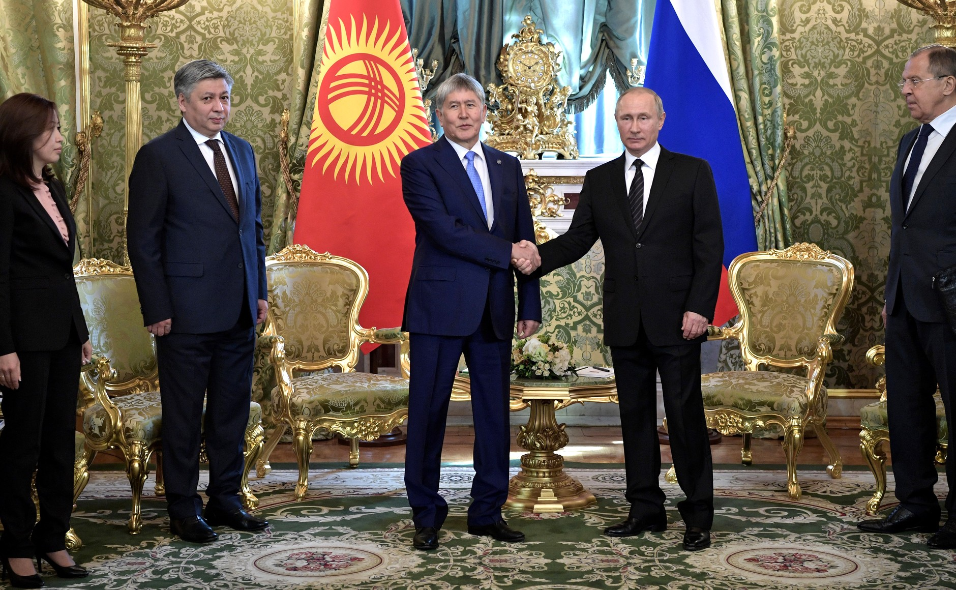 Перед началом российско-киргизских переговоров в узком составе